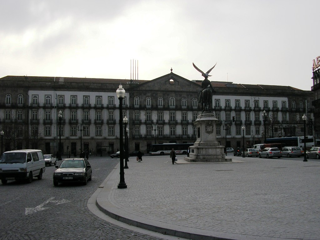 "Cardosas" palace in Porto, Portugal. Author: Manuel de Sousa.